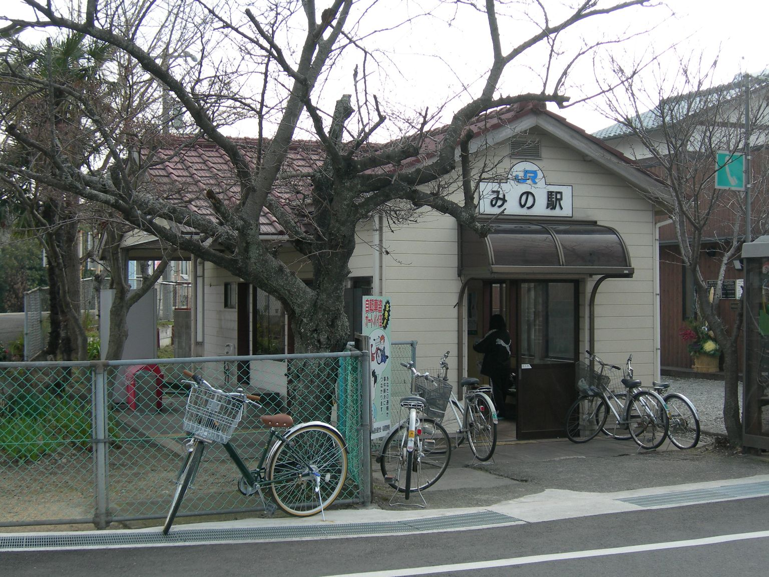 みの駅